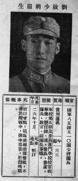 抗戰軍人忠烈錄第一輯中的烈士遺像